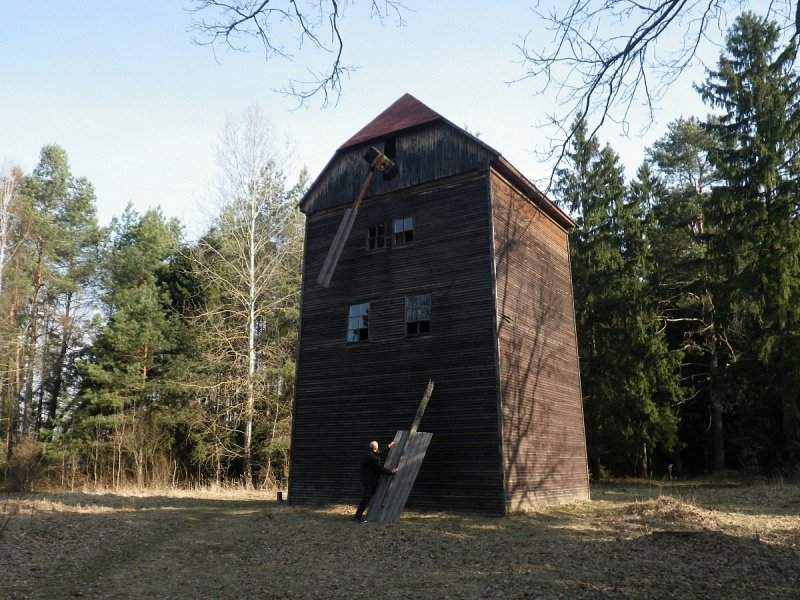 Глуша. Музей рамёстваў. Вятрак